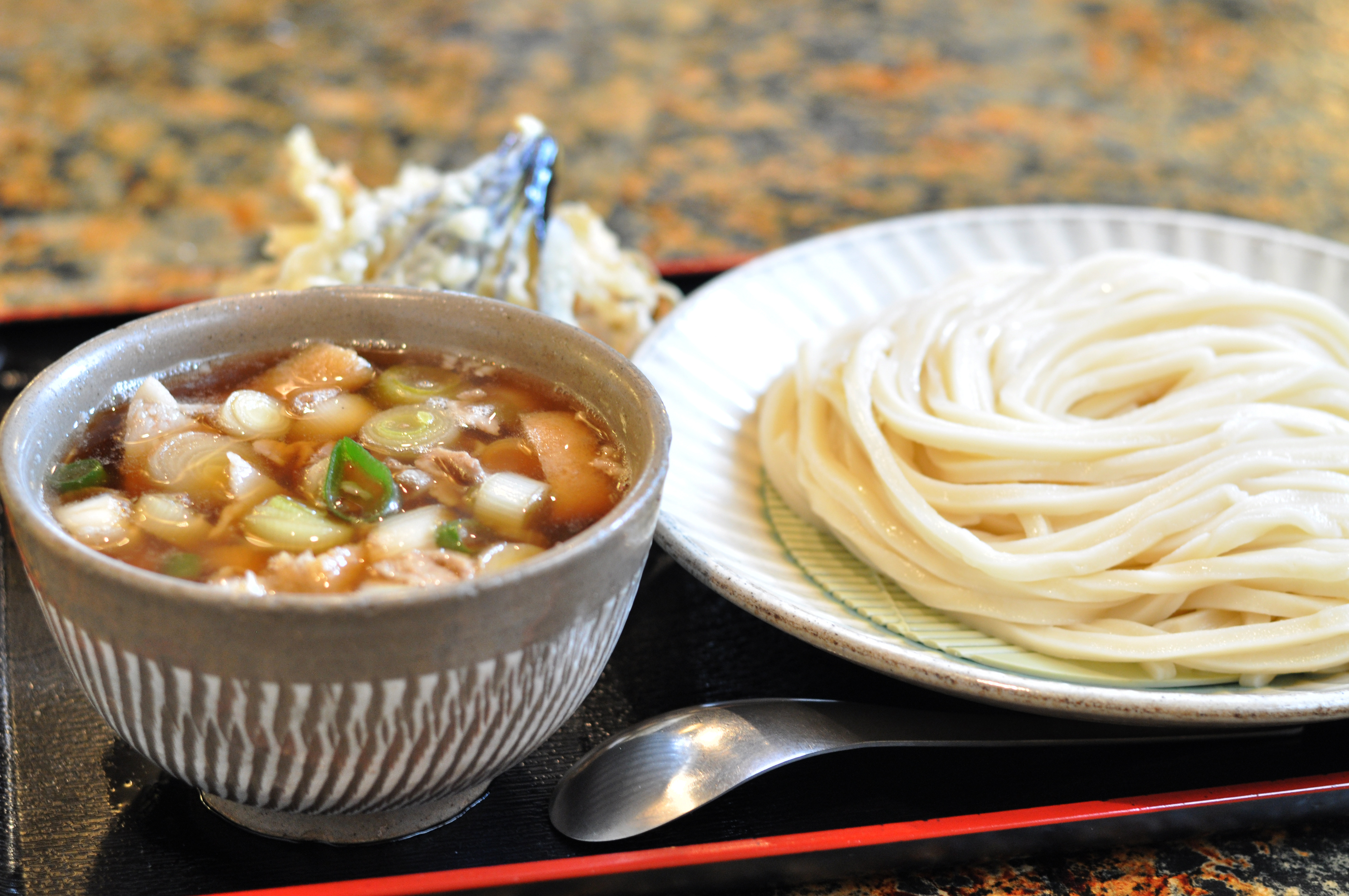 典型的な武蔵野うどんの参考画像 吉川市「製麺練場 風布うどん」の肉汁つけうどん（中）となすごぼう天